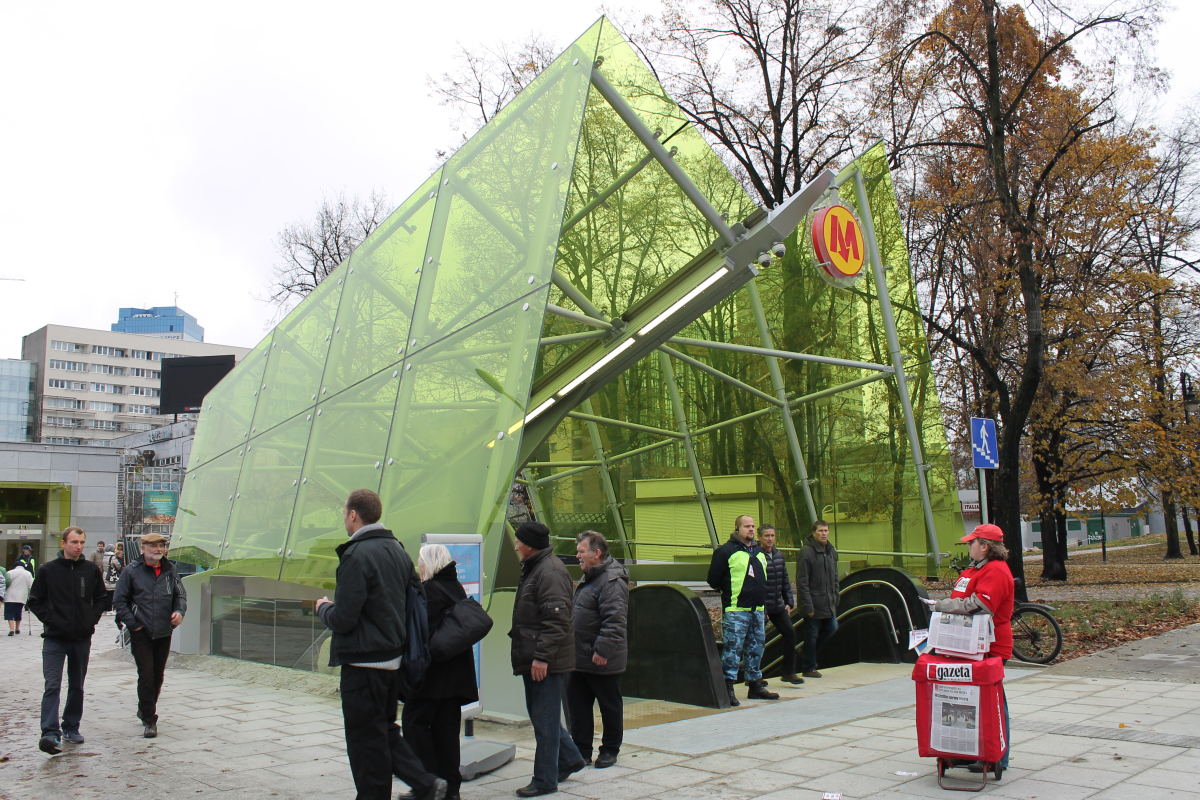 Wejście na stację C11 Świętokrzyska.